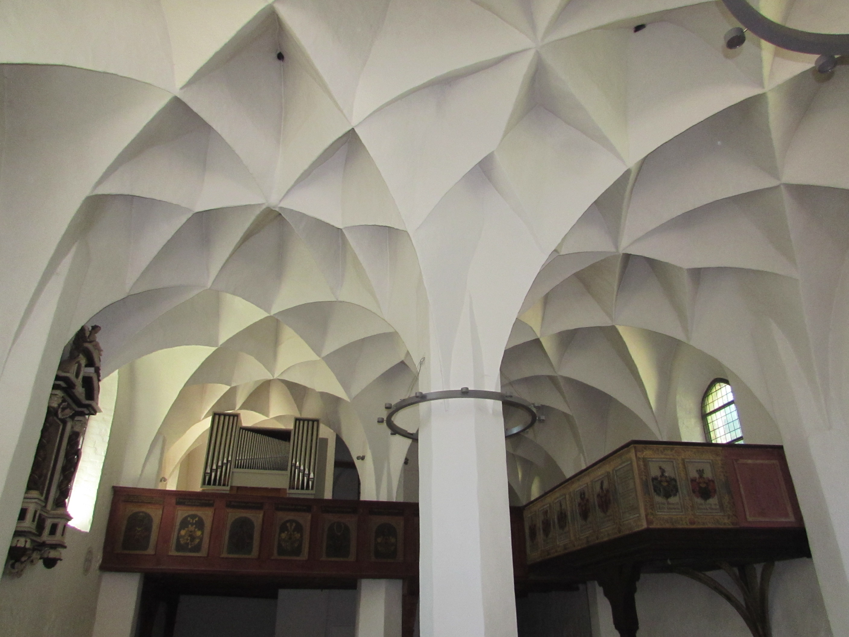 st. petri, innenansicht, deckengewölbe und empore, brandenburg an der havel